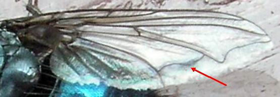 flêche=veine médiane incurvée vers le haut